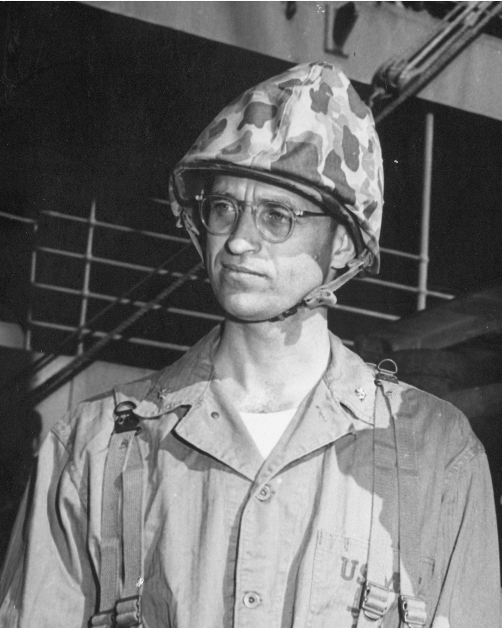 Brigadier General James Roosevelt, USMC, son of U.S. President Franklin D. Roosevelt